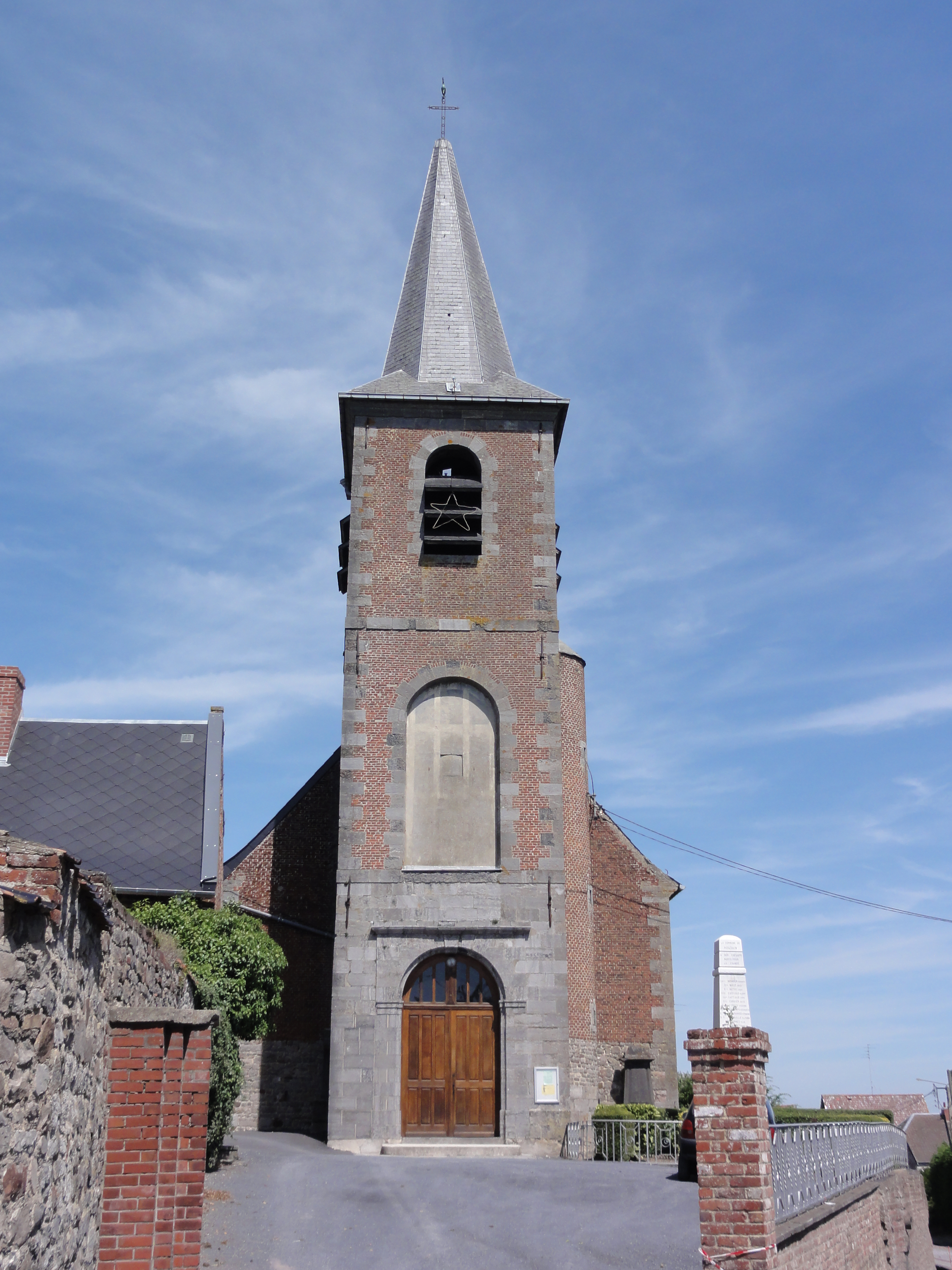 Houdain-lez-Bavay (Nord, Fr) église paroissiale Saint-Martin, façade This building is indexed in the Base Mérimée, a database of architectural heritage maintained by the French Ministry of Culture, under the references IA59000655 and type .